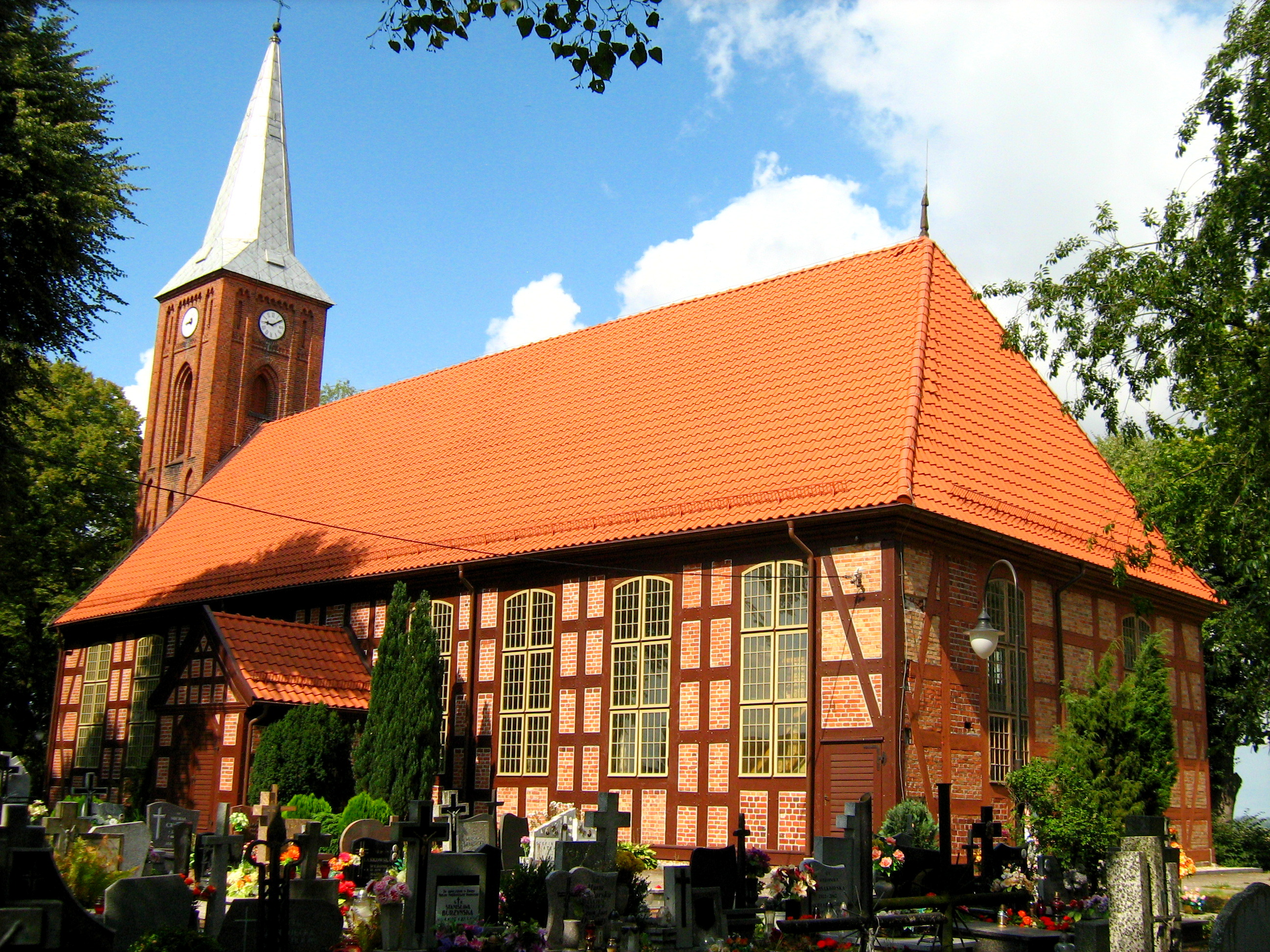 Jegłownik, ul. Nogatu 17 - dawny kościół ewangelicki, obecnie rzymskokatolicki parafialny p.w. Matki Bożej Nieustającej Pomocy, 1804, kon. XIX.